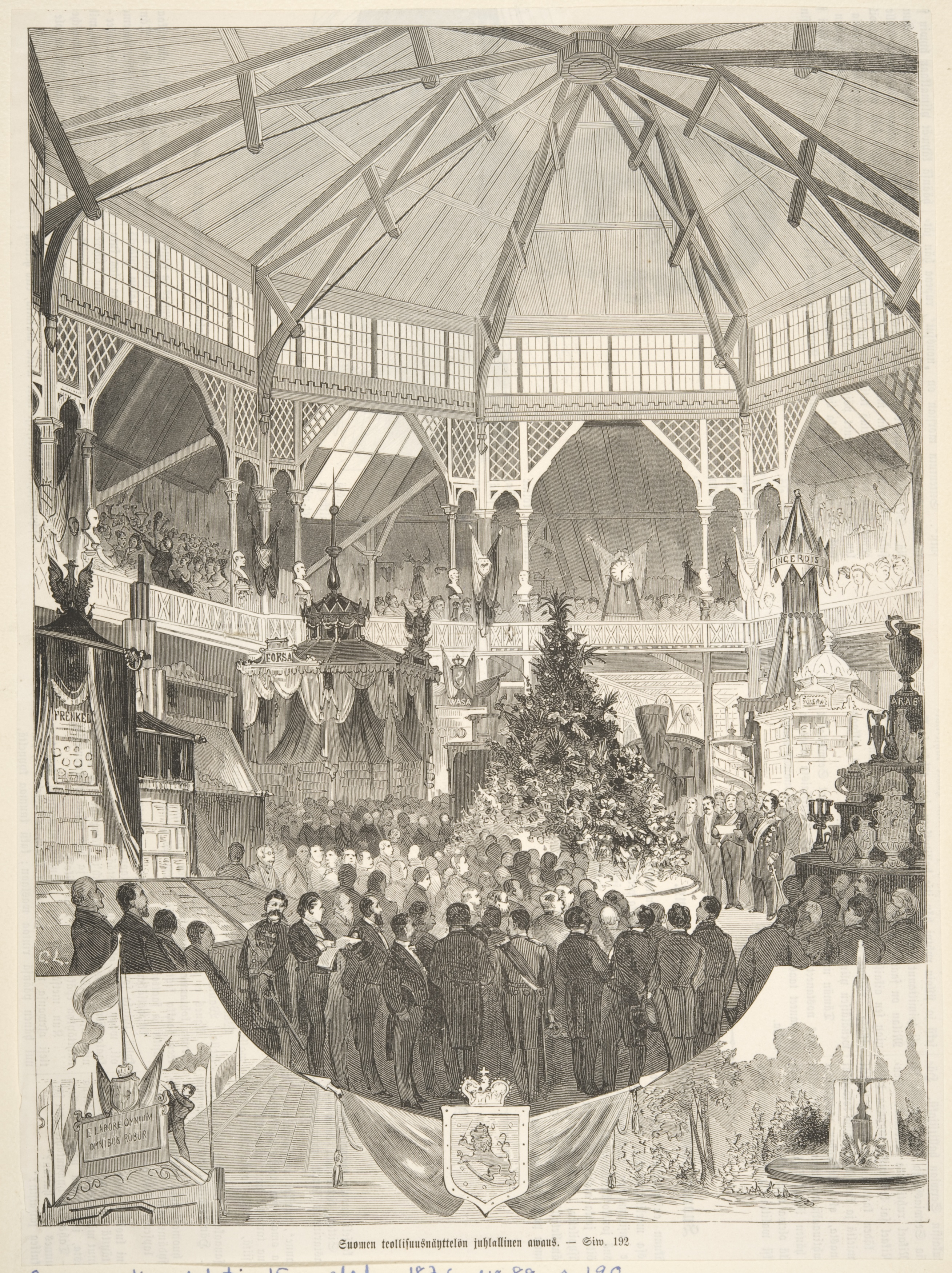 Puupiirros, joka ilmestyi alunperin Suomen Kuvalehdessä o 88 15.8.1876